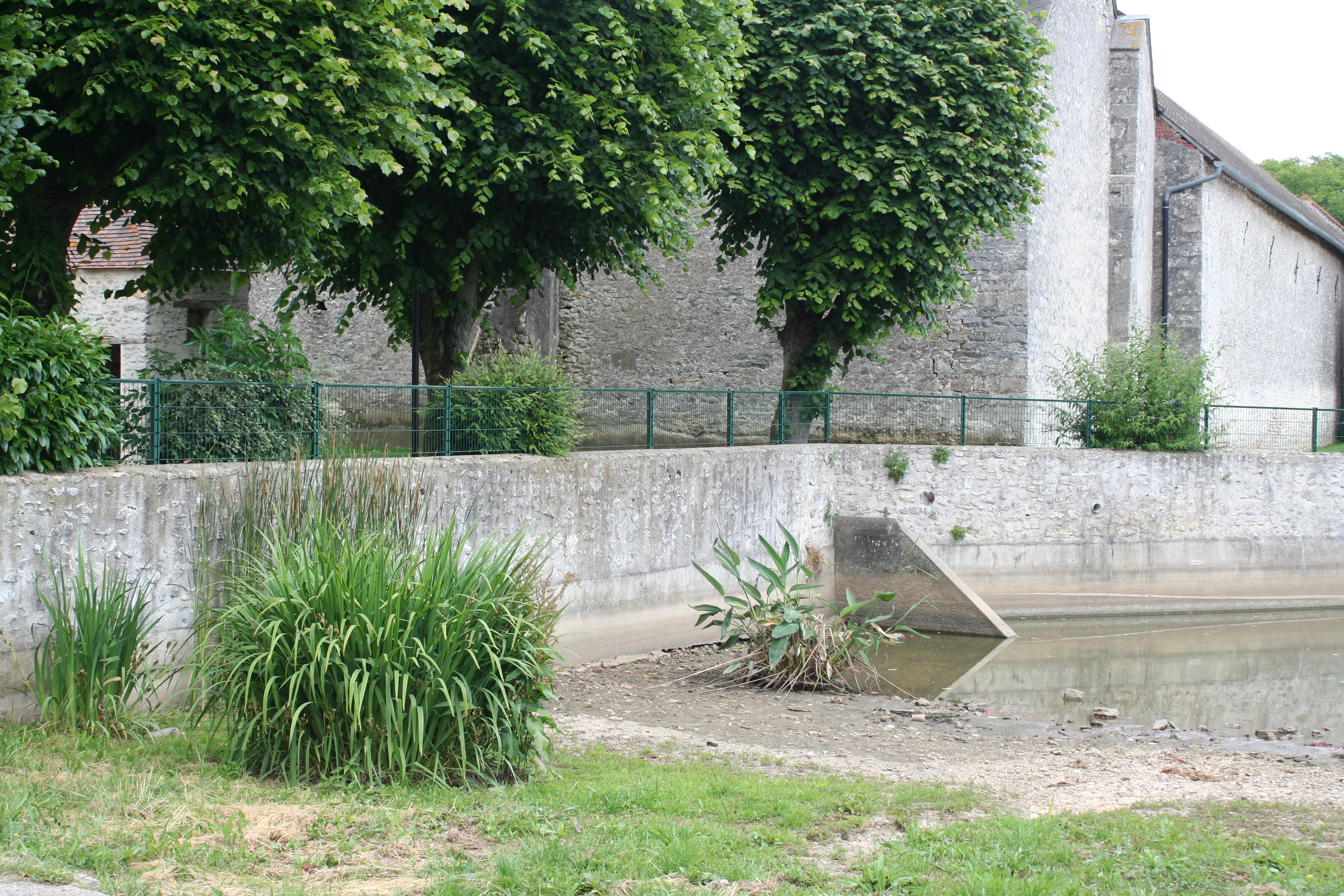 Une vue de la mare et de la place de l'église à Congerville-Tionville